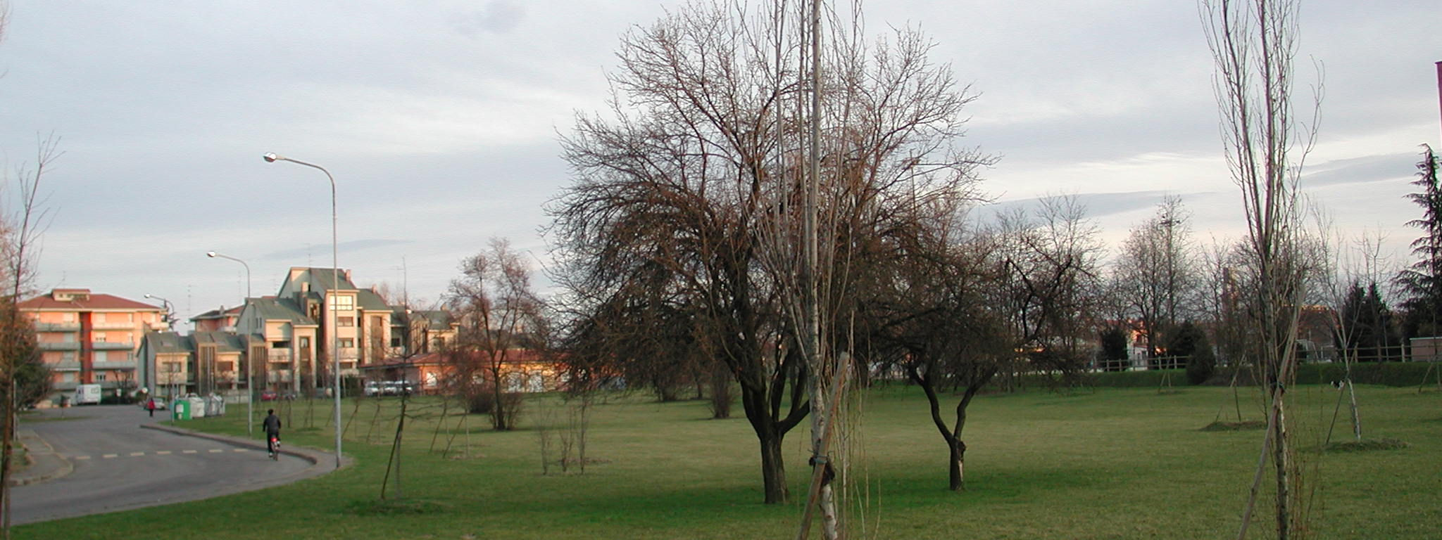 Reggio Emilia quartiere Buco del Signore Paolo da Reggio, 2002